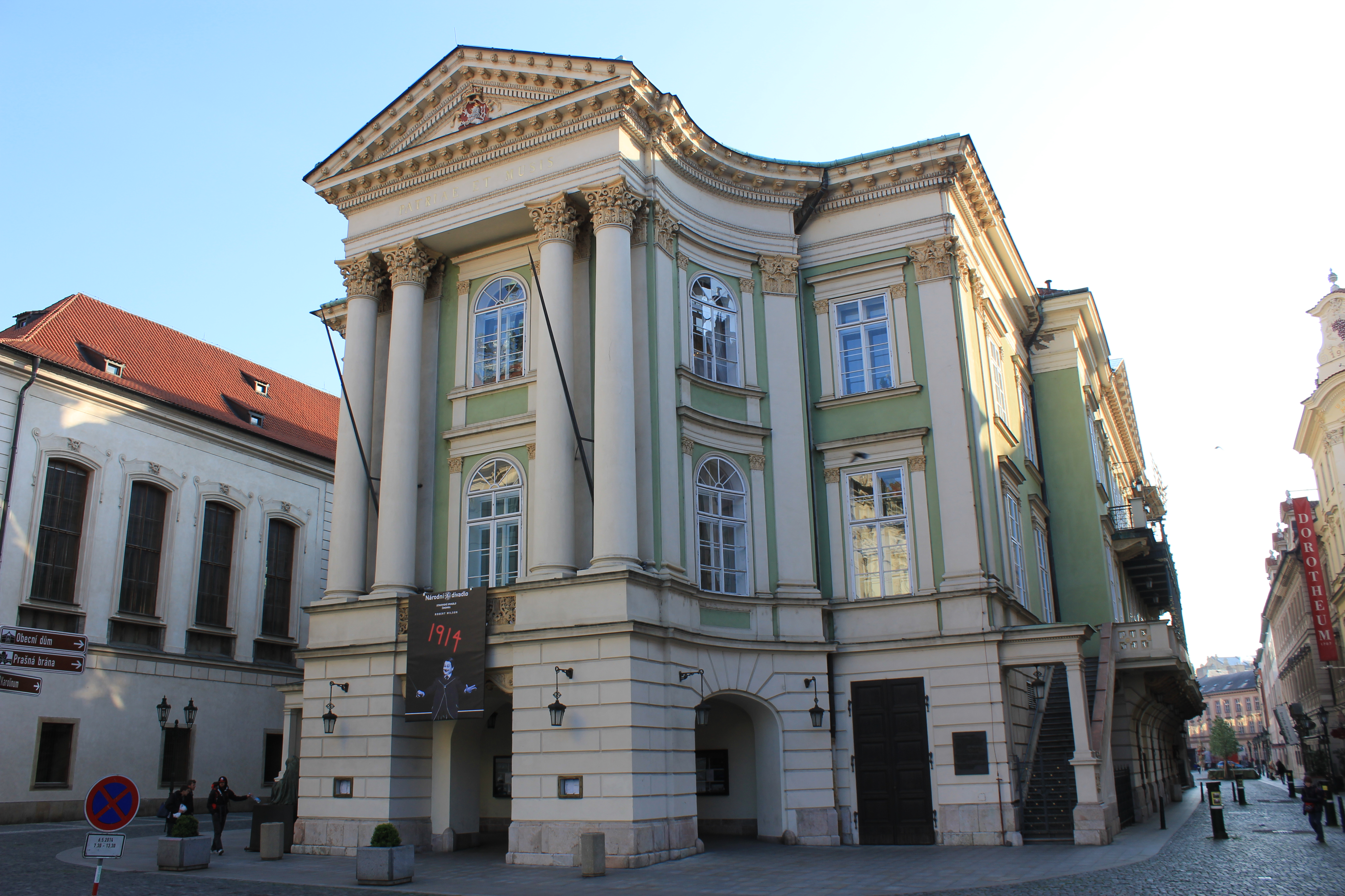 Stavovske teatret